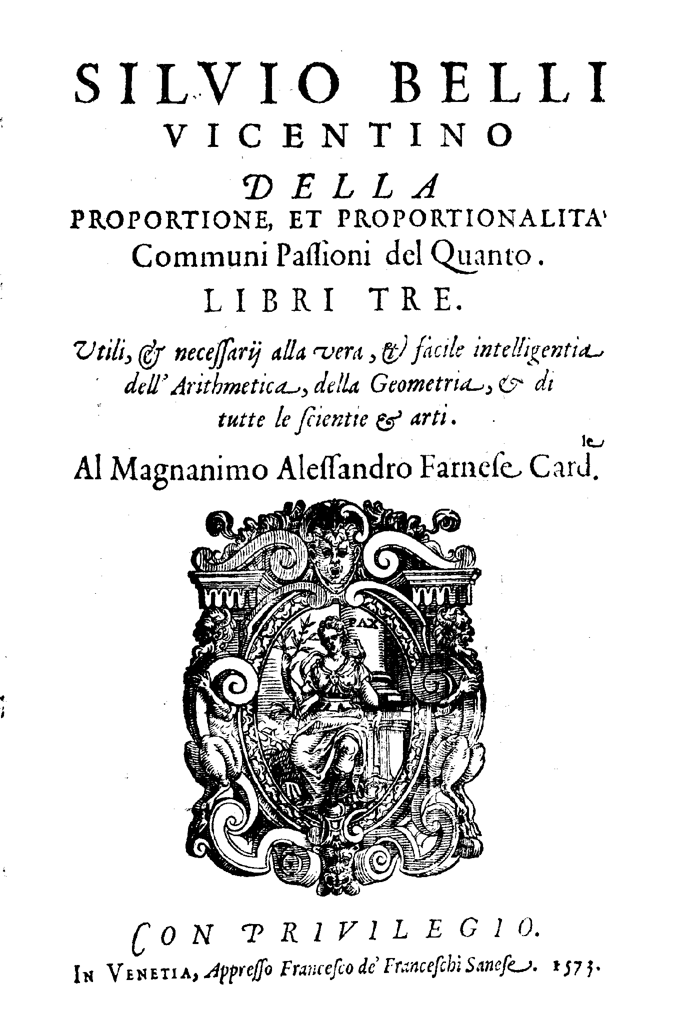 Silvio Belli vicentino Della proportione, et proportionalità communi passioni del quanto. Libri tre. Utili & necessari alla vera & facile intelligentia dell' Arithmetica ... . - In Venetia : appresso Francesco de' Franceschi sanese, 1573. - [4], 40 c. ; 4º .